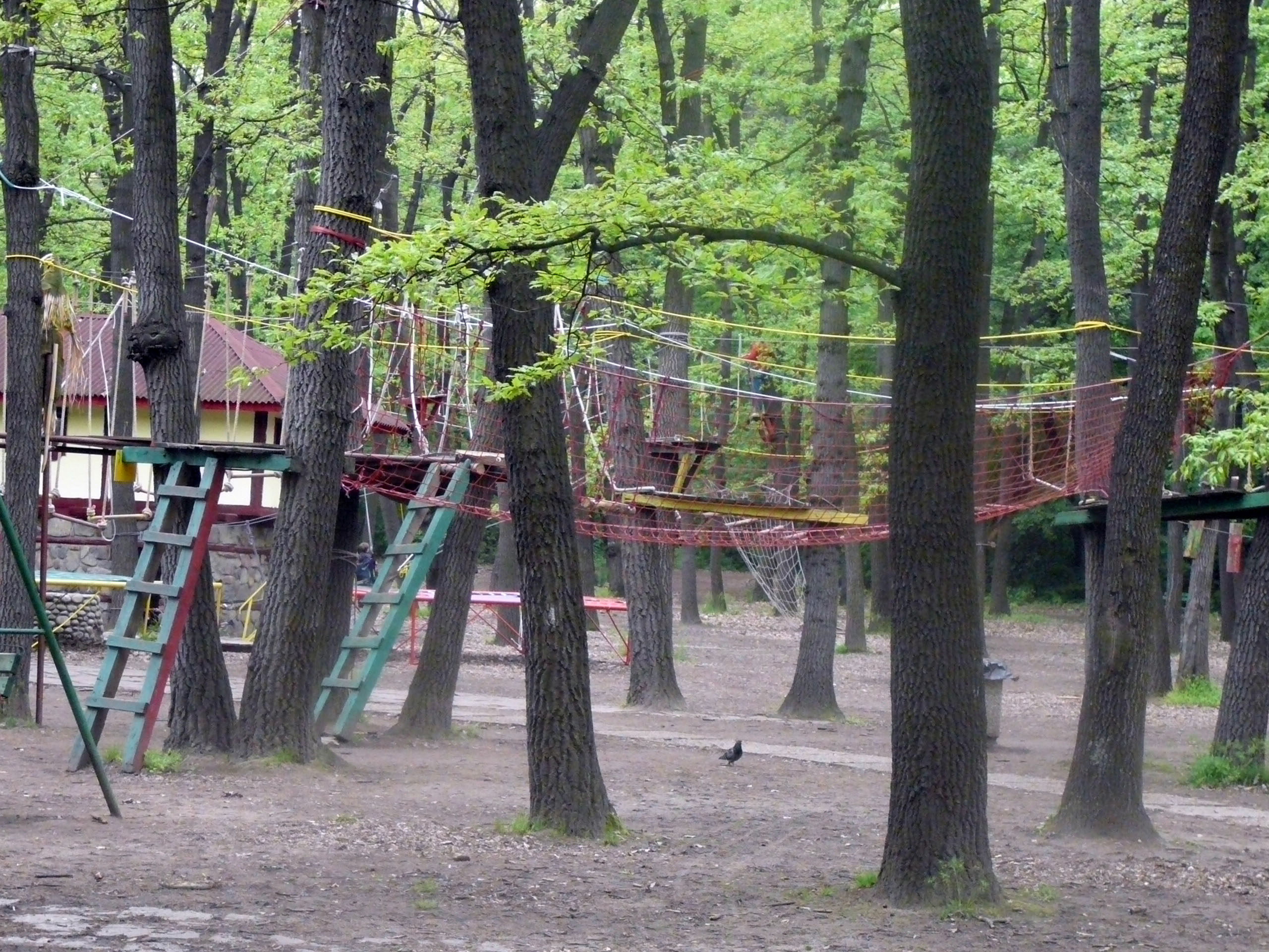 Borisova garden in Sofia,Bulgaria